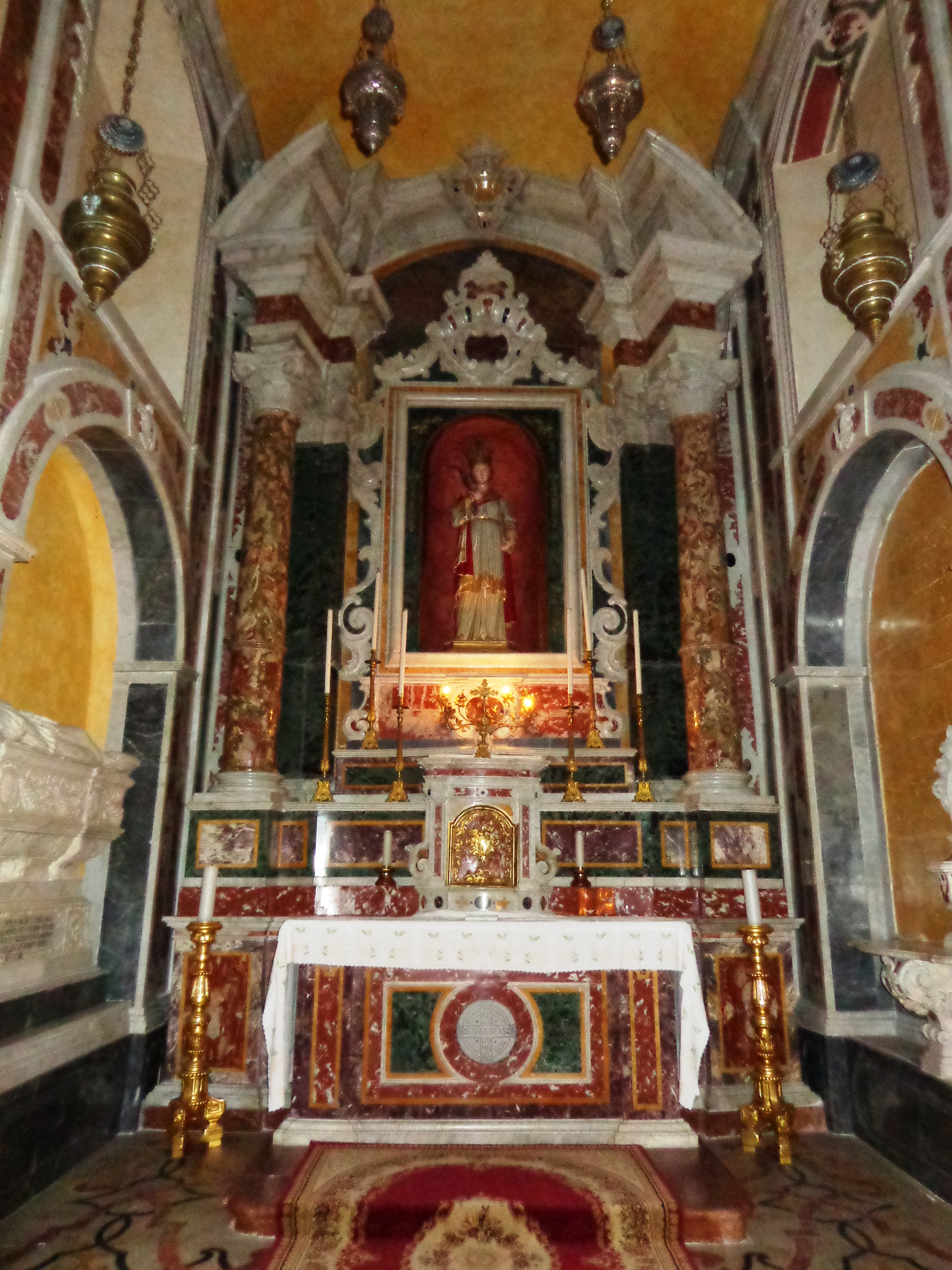 Cattedrale Patti 14